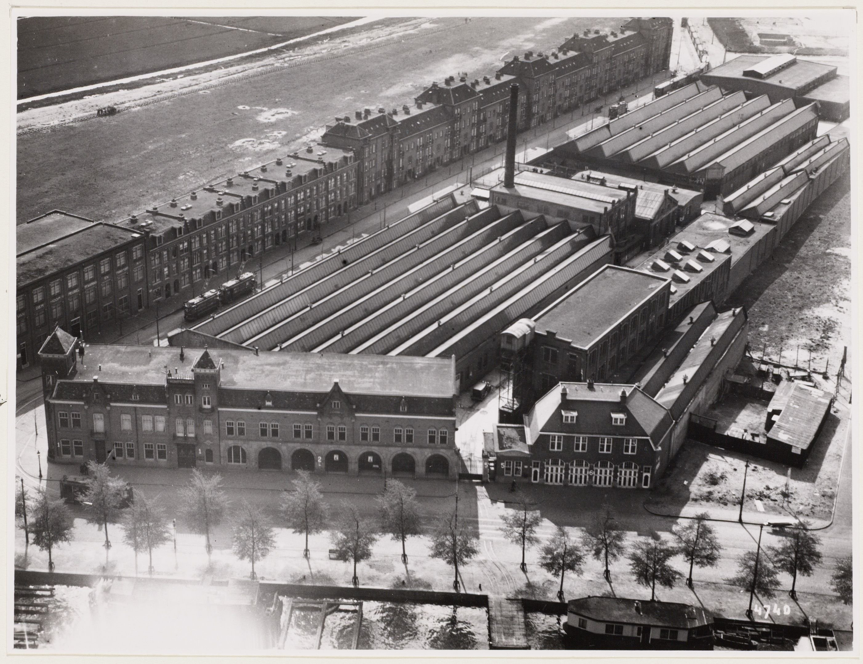 Beschrijving Luchtfoto van de Amstel en omgeving gezien in westelijke richting Links de Trompenburgstraat. Midden de N.V. Industriële Maatschappij Trompenburg (Spyker Automobielfabriek), Amsteldijk 163-167. Documenttype foto Collectie Collectie Stadsarchief Amsterdam: foto-afdrukken Datering 1927 Geografische naam Amsteldijk, Trompenburgstraat, Amstel, Amsteldijk Inventarissen Afbeeldingsbestand A04139001117